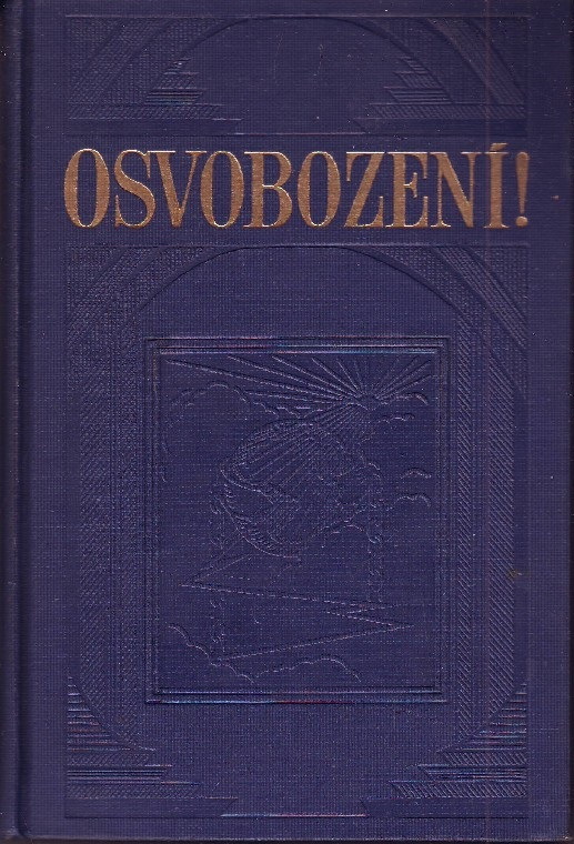 Książka J.F. Rutherforda - Osvobozeni (1926) w języku czeskim